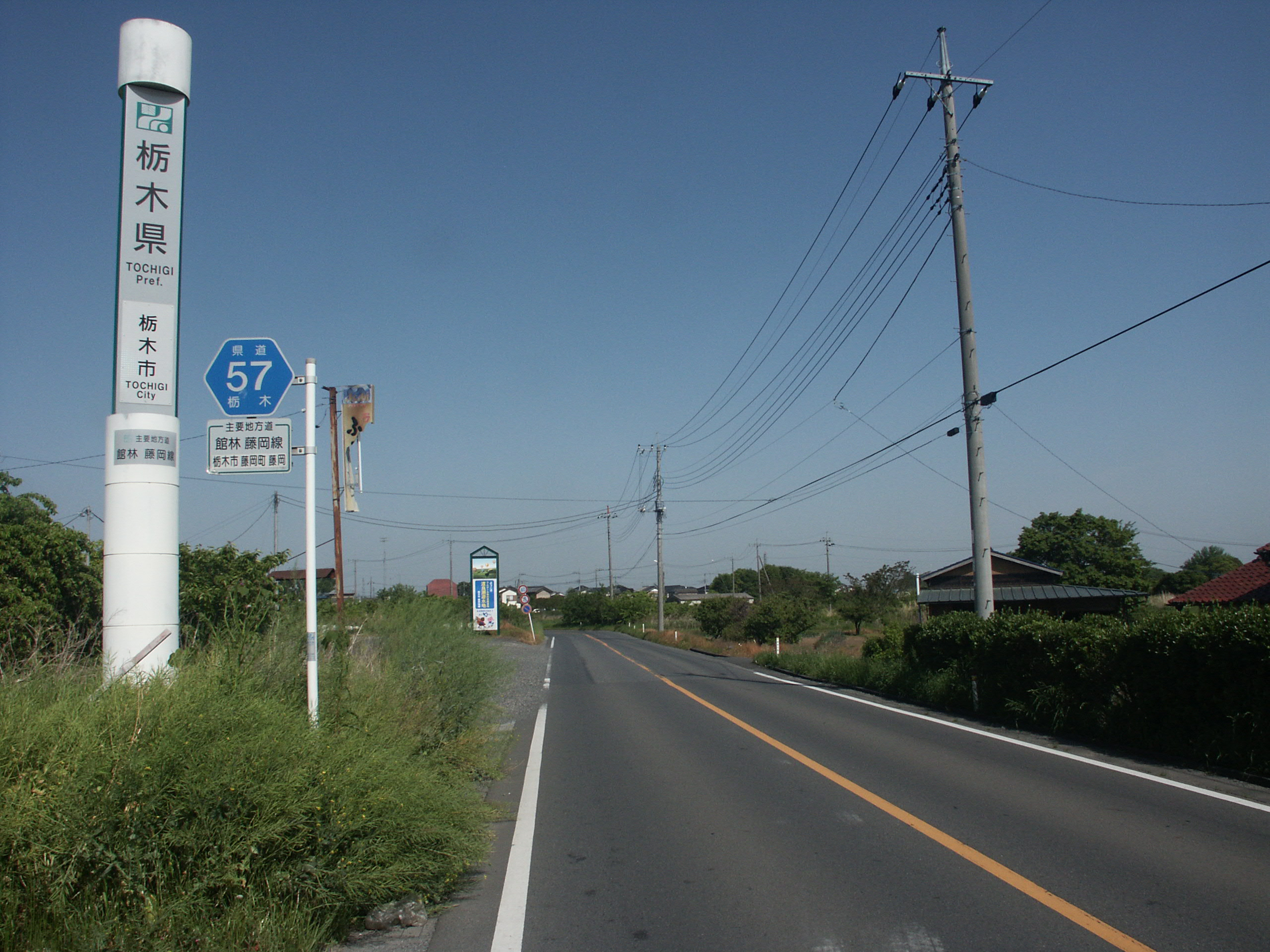 栃木県道５７号線栃木市藤岡町藤岡付近